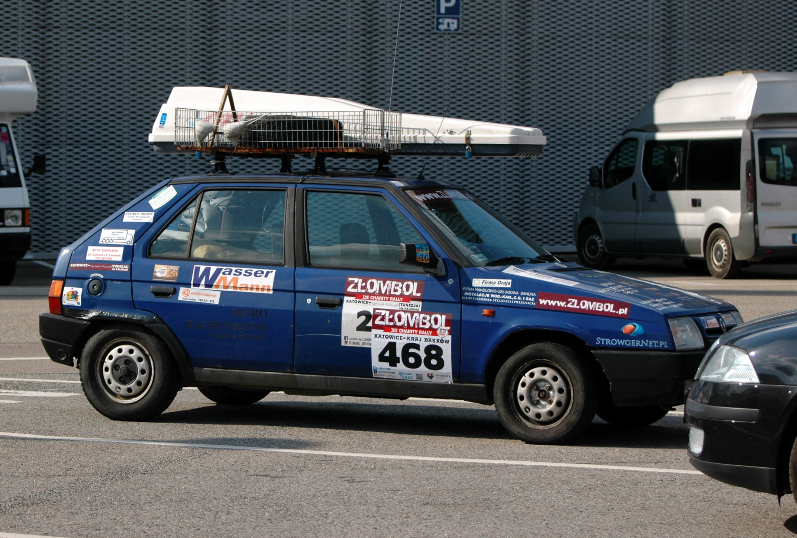 Sinsheim - Złombol 2017